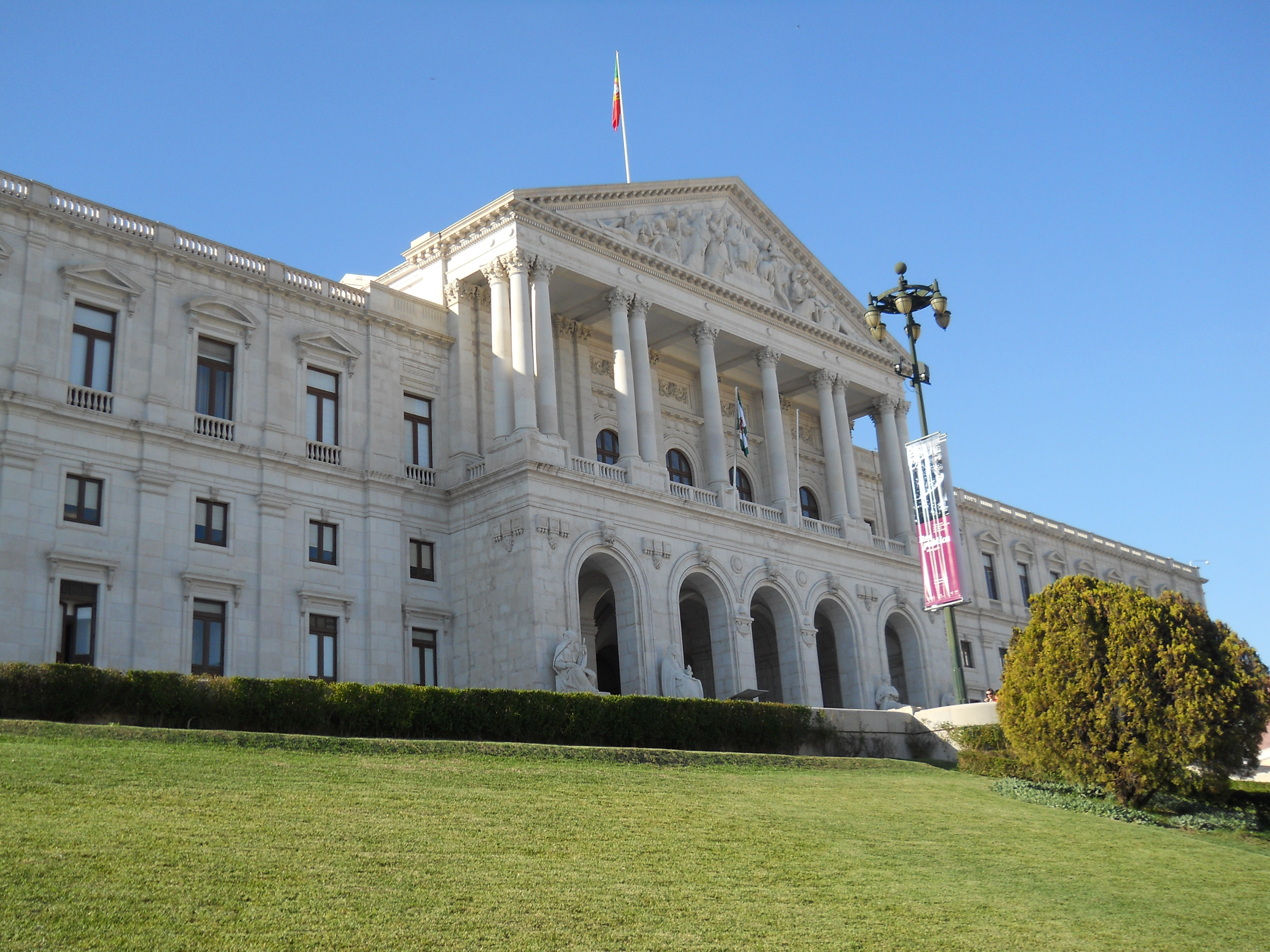 Lisbon Portugal 116 The Palácio de São Bento